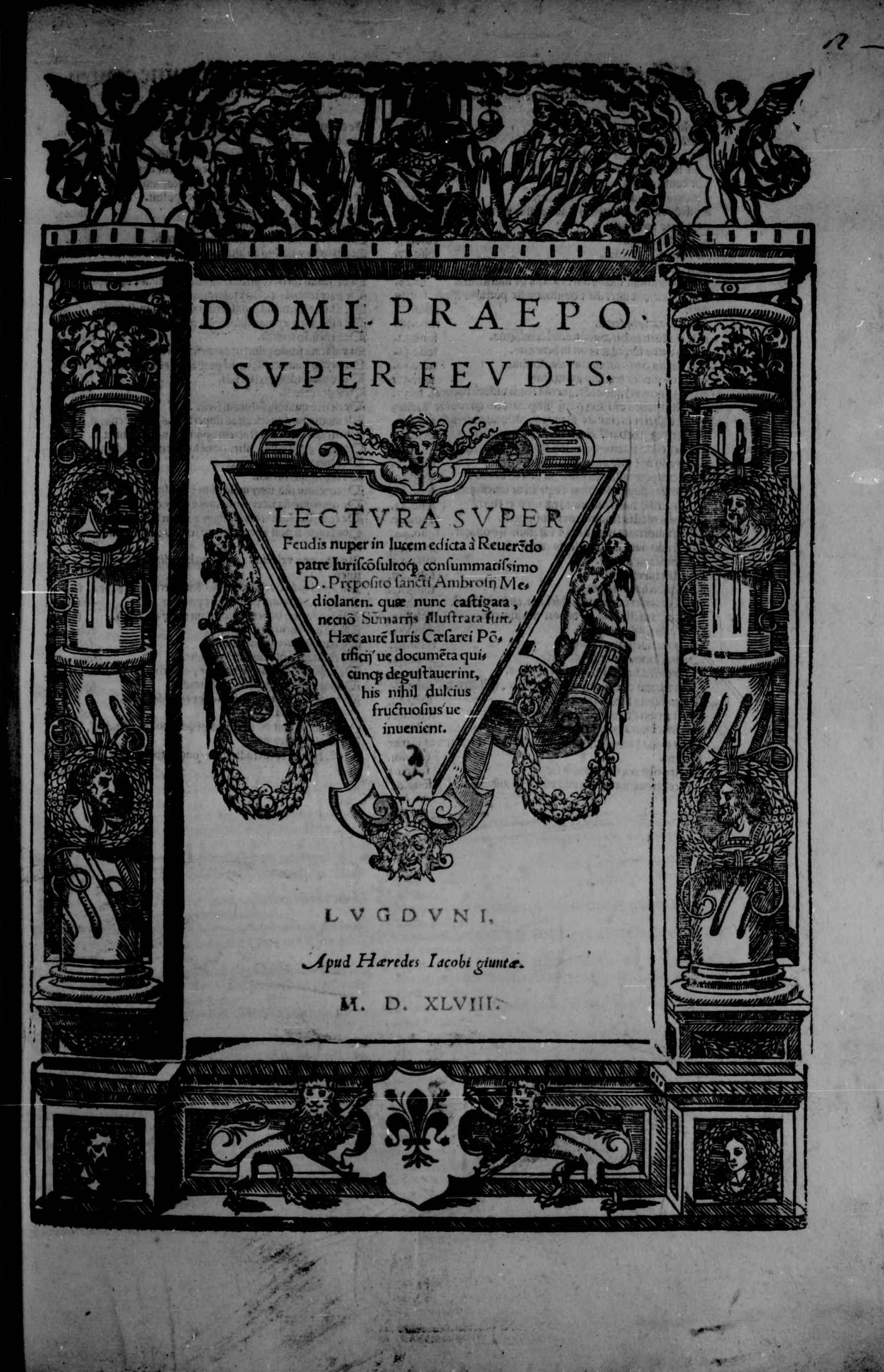 Frontespizio